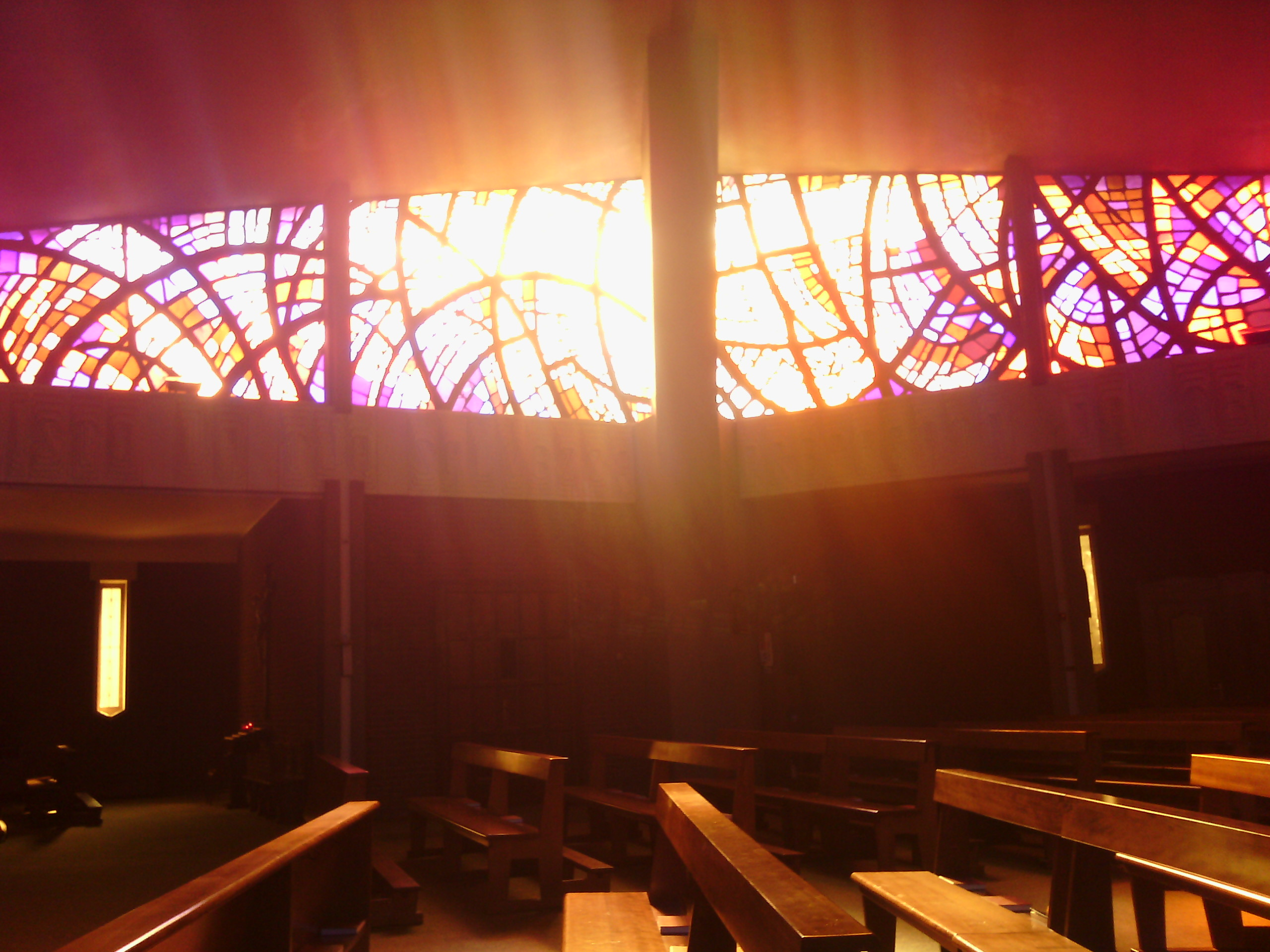 Chiesa parrocchiale di Mesero (MI) - Italia. Particolare delle vetrate interne.